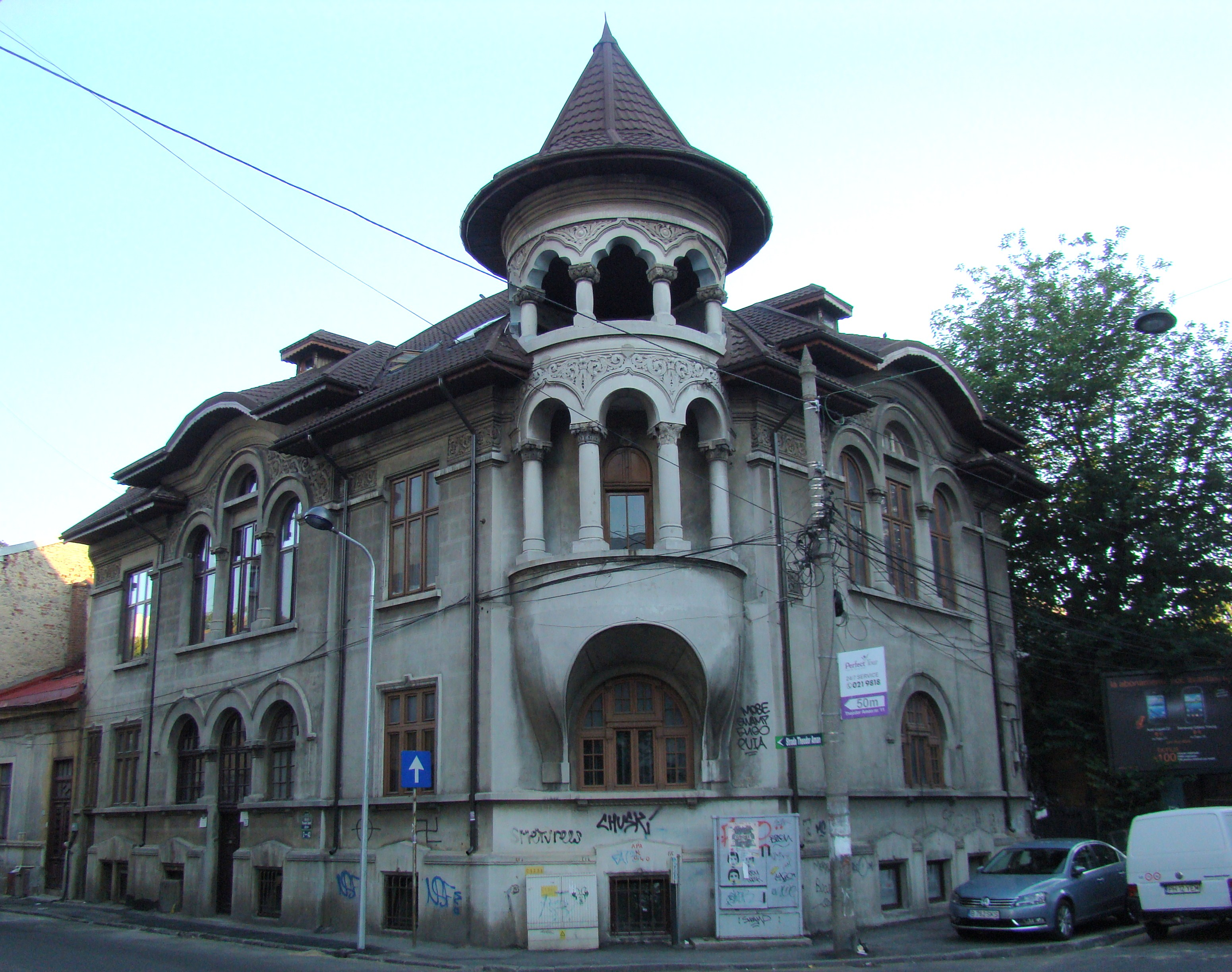 Casă monument istoric, str. Theodor Aman, nr.31